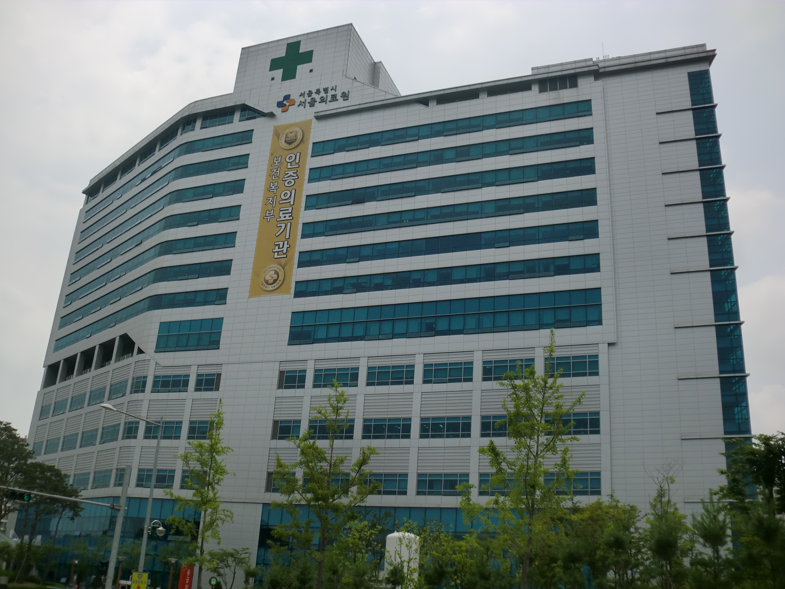 서울특별시 중랑구에 있는 서울특별시 서울의료원